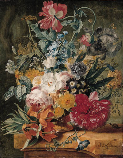 Νεκρή φύση με ανοιξιάτικα λουλούδια, Λάδι σε Ξύλο